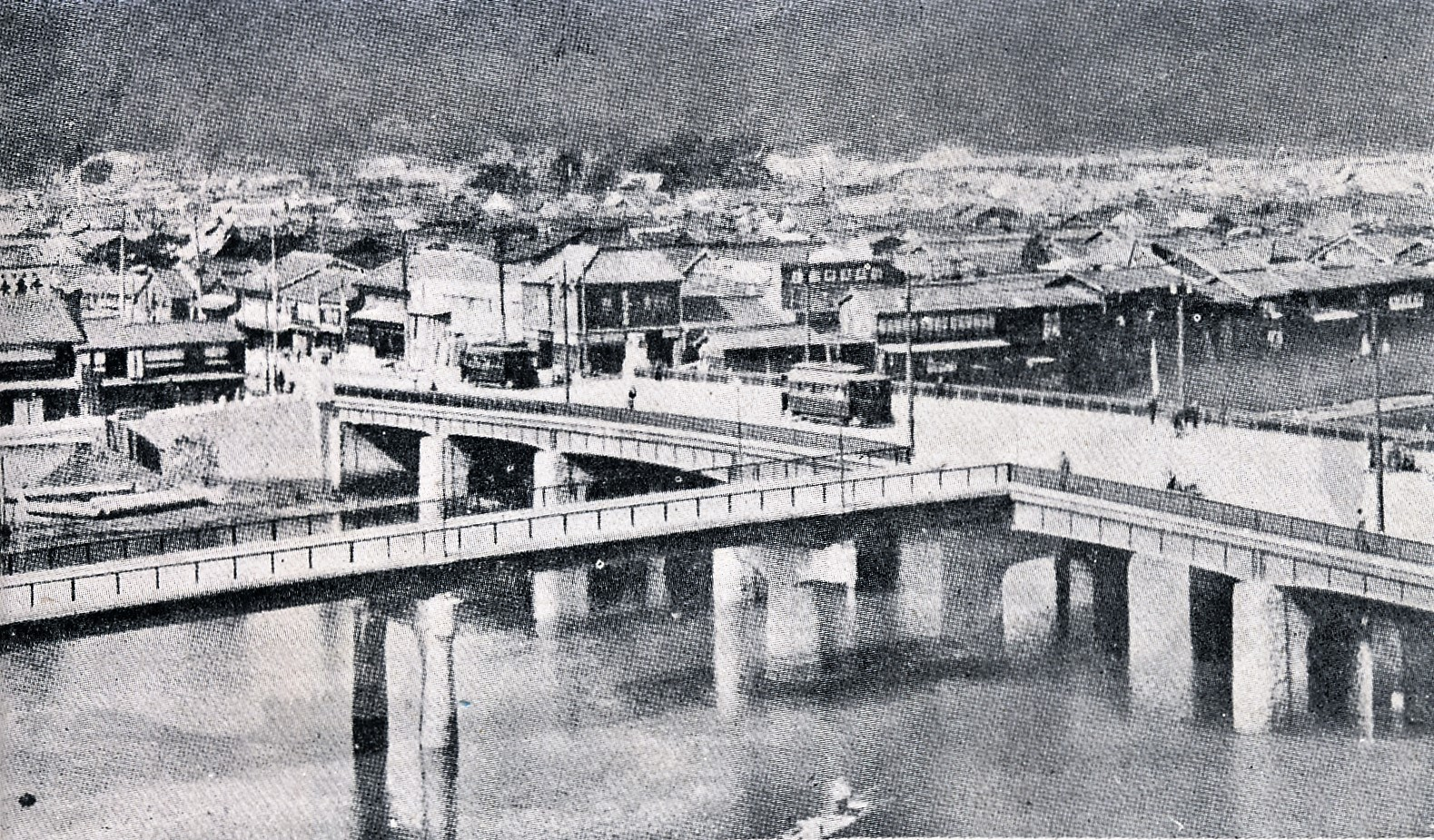 戦前の広島市相生橋